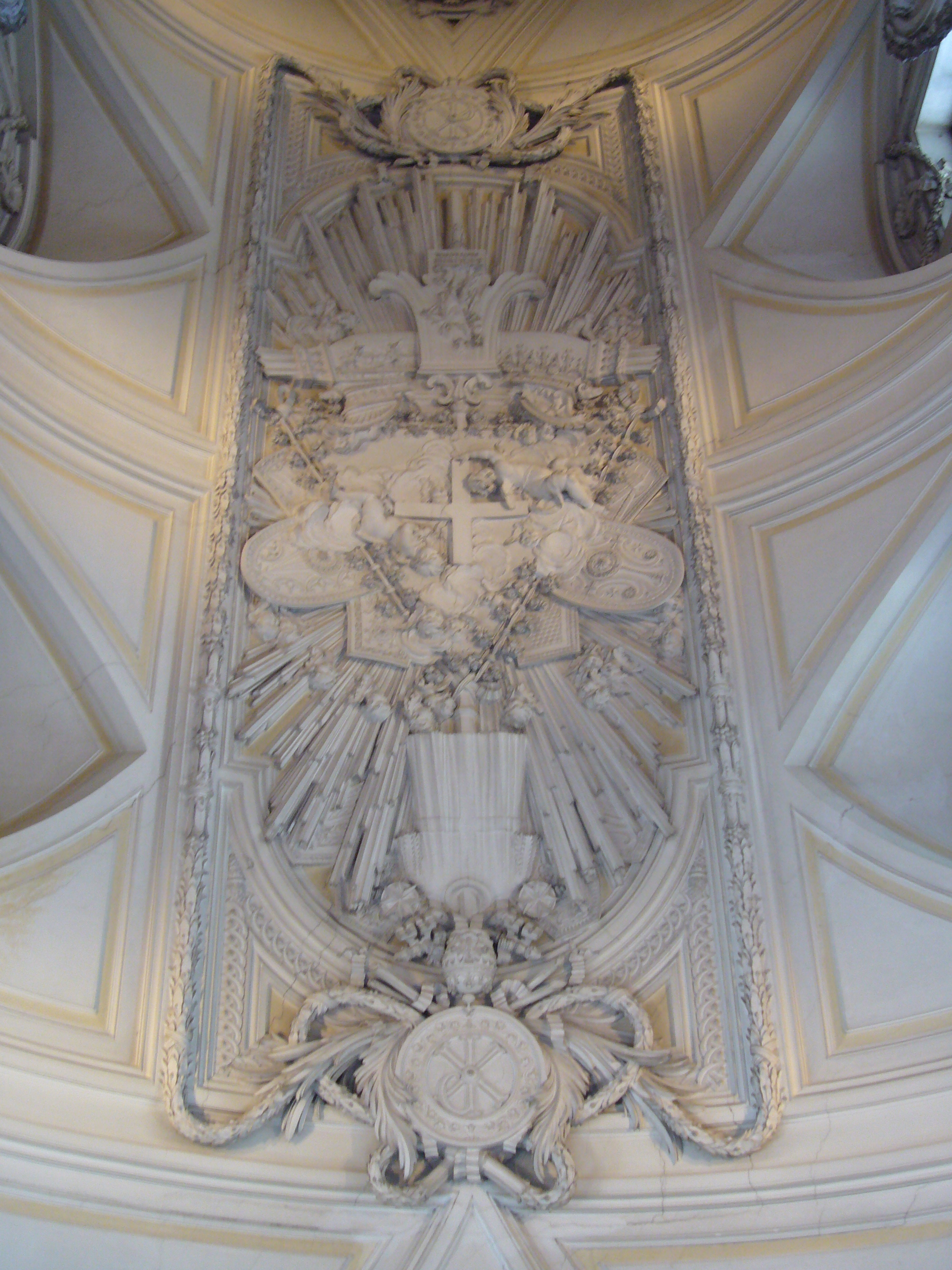 Roma, Villa del Priorato dei Cavalieri di Malta: Santa Maria del Priorato, panoplia in stucco del soffitto (Piranesi)